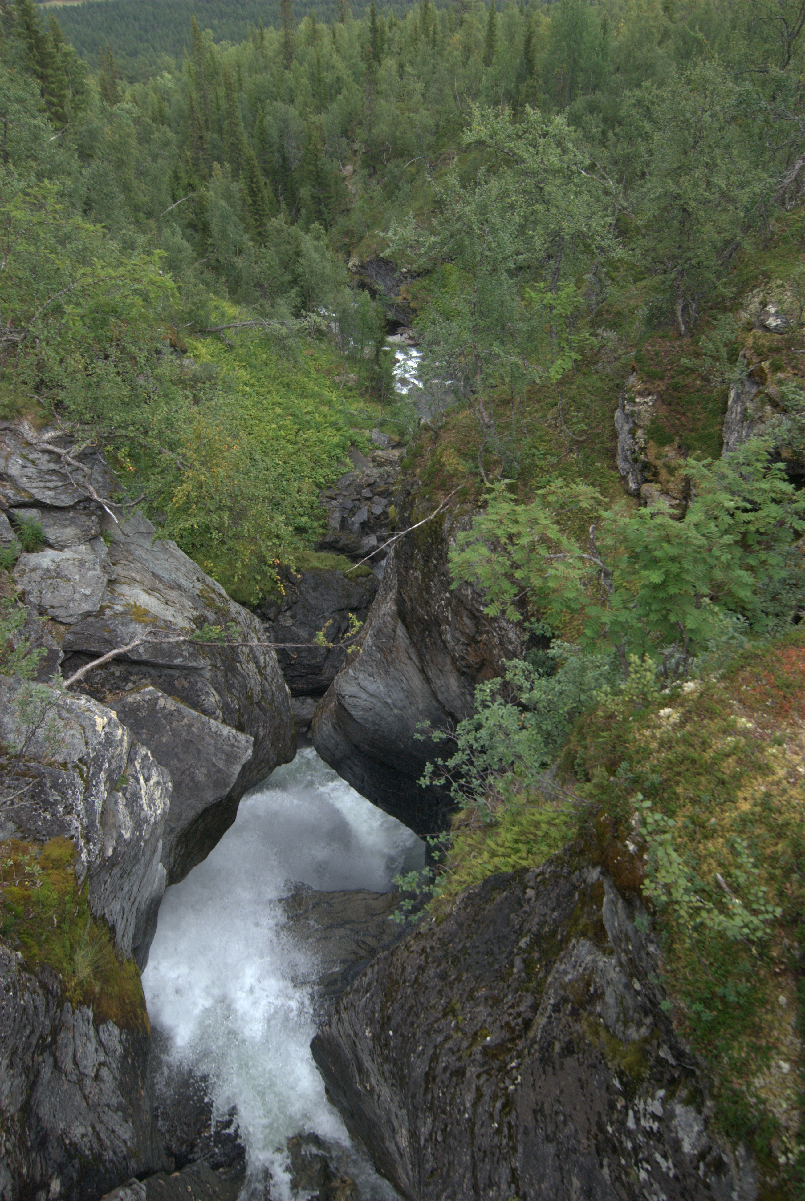 Small canyon not far from Ammarnäs, in Vindelfjällen. Seen from the Kungsleden